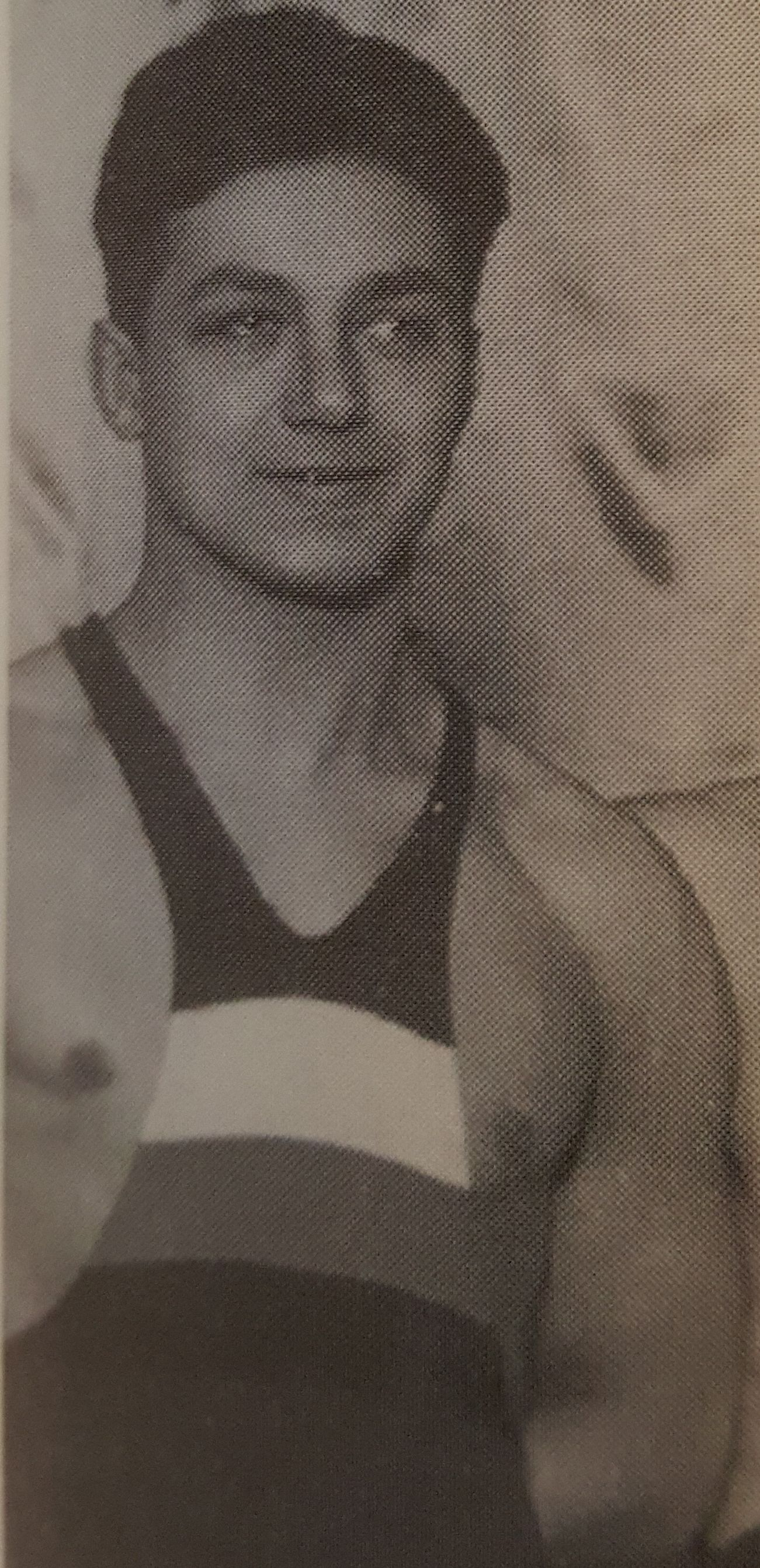 Josef Přibyl, československý zápasník, účastník OH v Berlíně